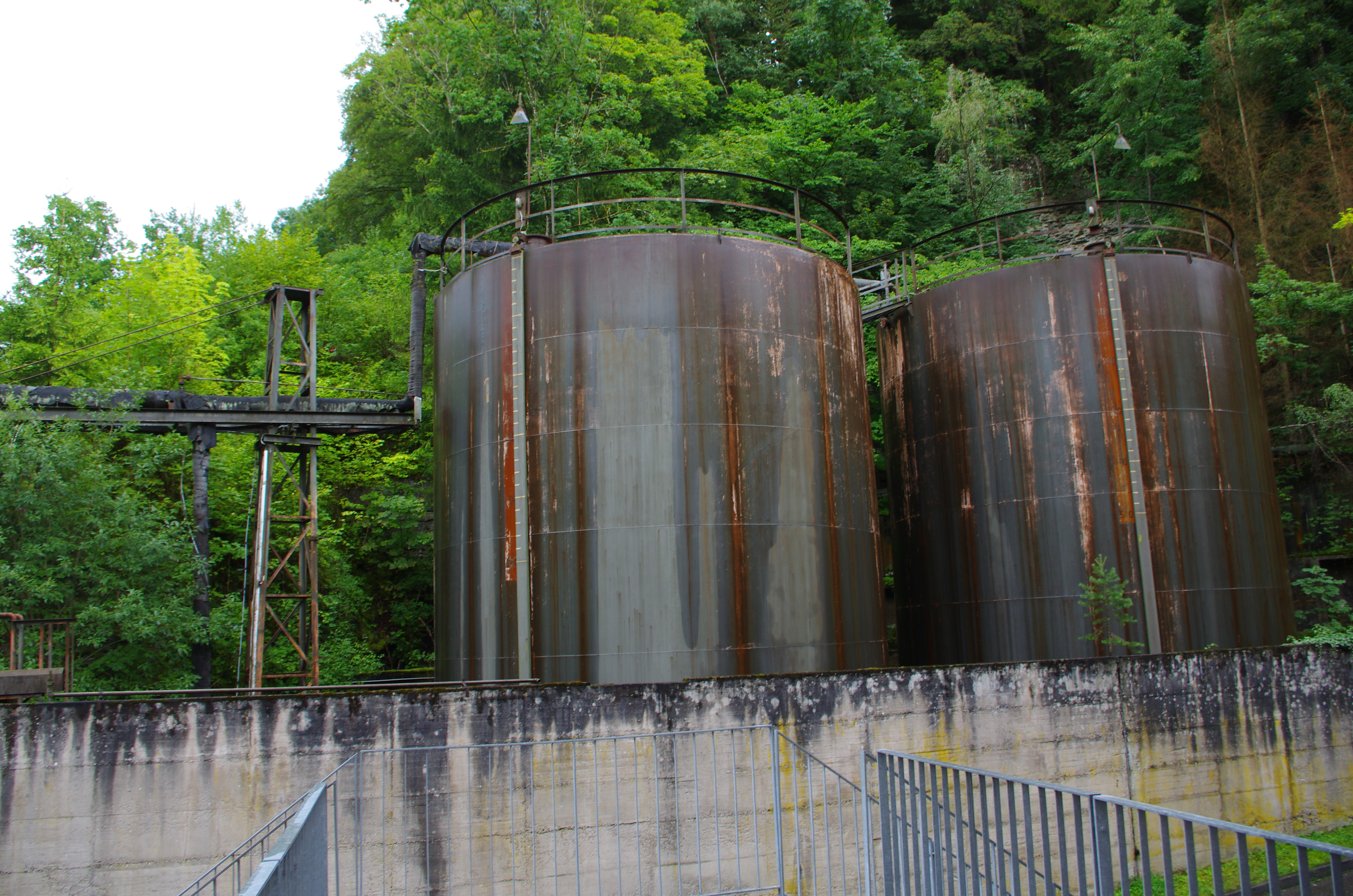 Öltanks in Auffangraum, Kraftwerk Rottweil, Neckartal 68, Rottweil, Baden-Württemberg, Deutschland